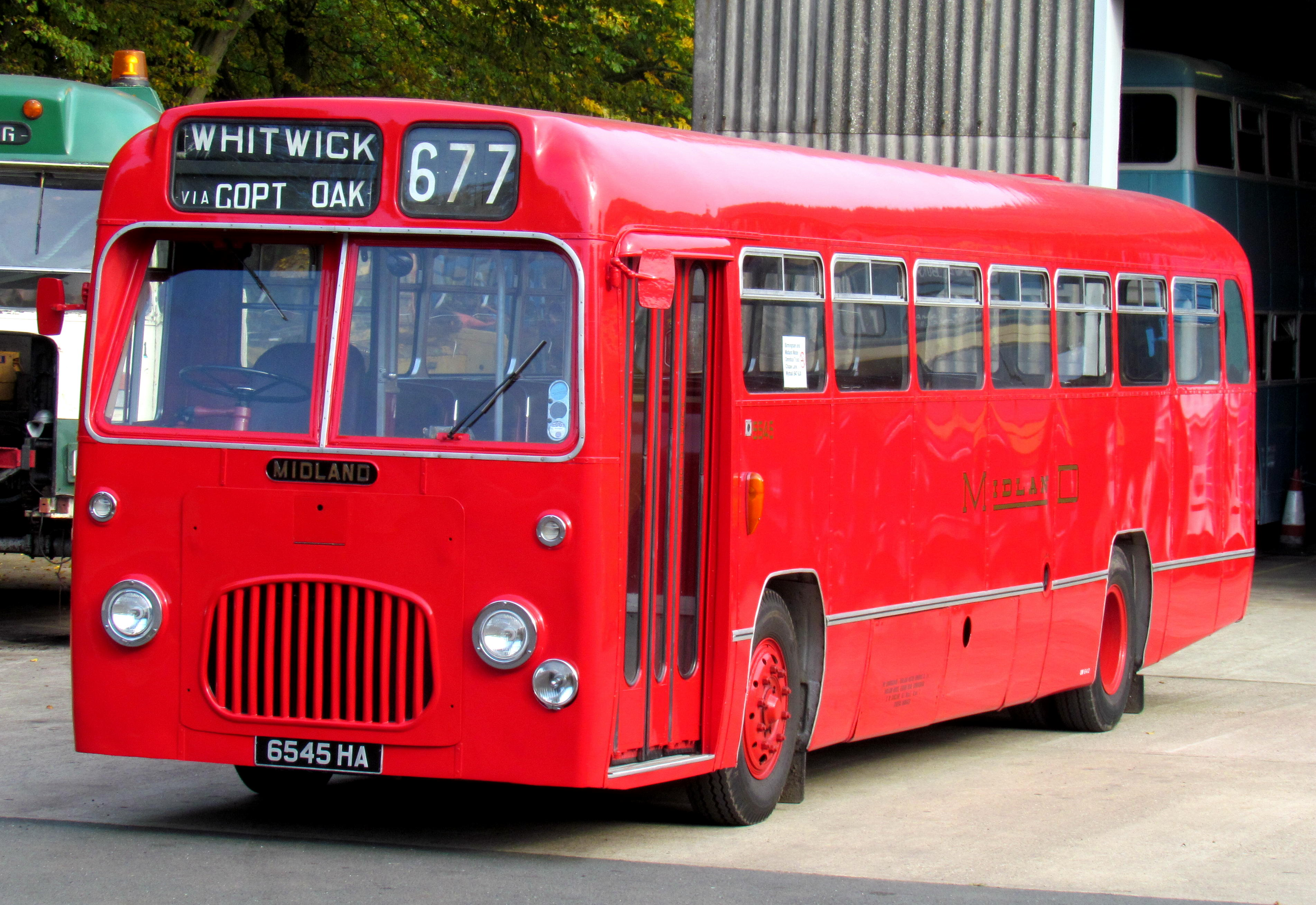 1964 - BMMO - 6545 HA